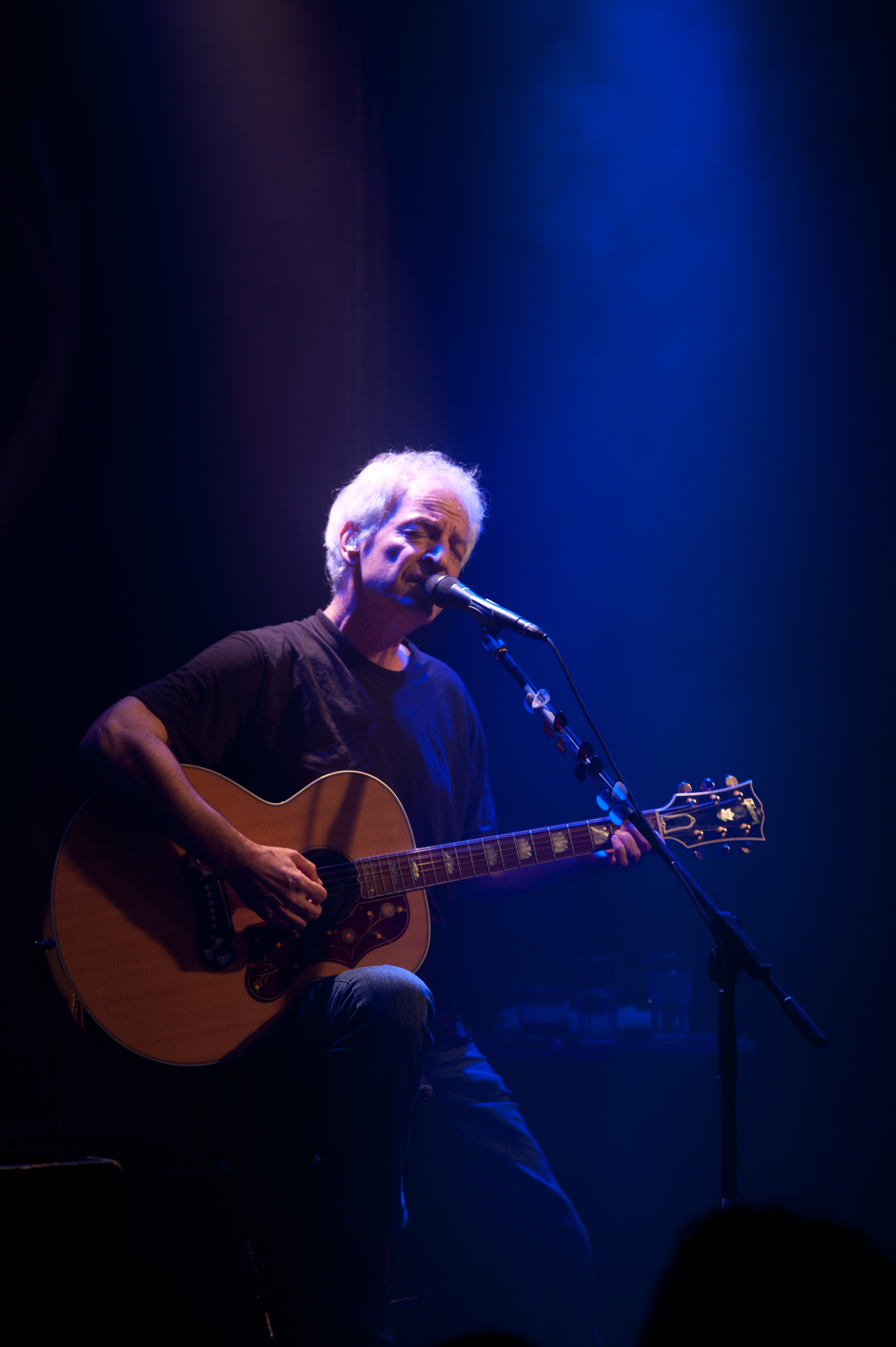 שלום חנוך בהופעה במועדון הזאפה בתל אביב